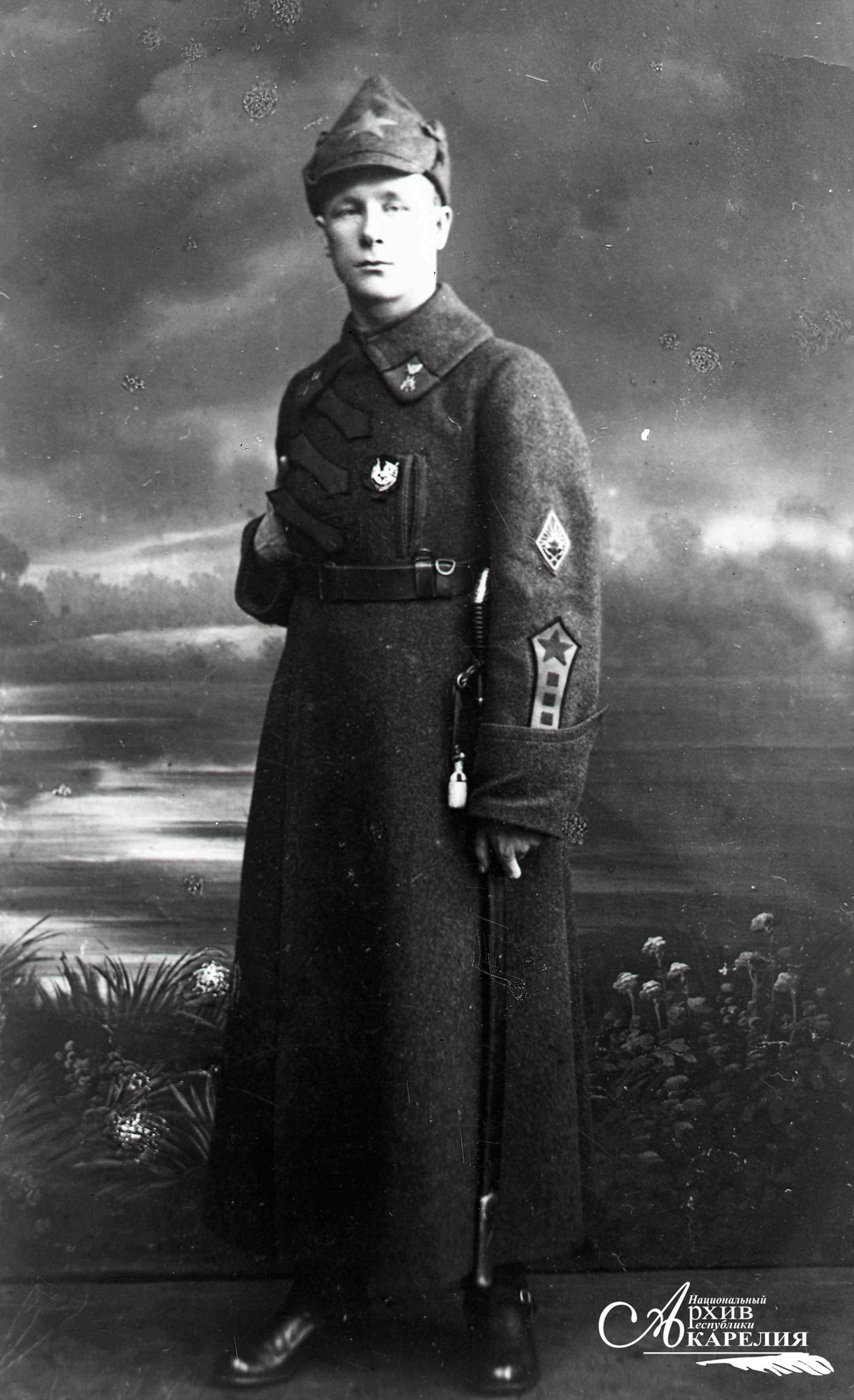 Тойво Антикайнен (фин. Toivo Antikainen; 1898 — 1941) — финский, советский политический и военный деятель